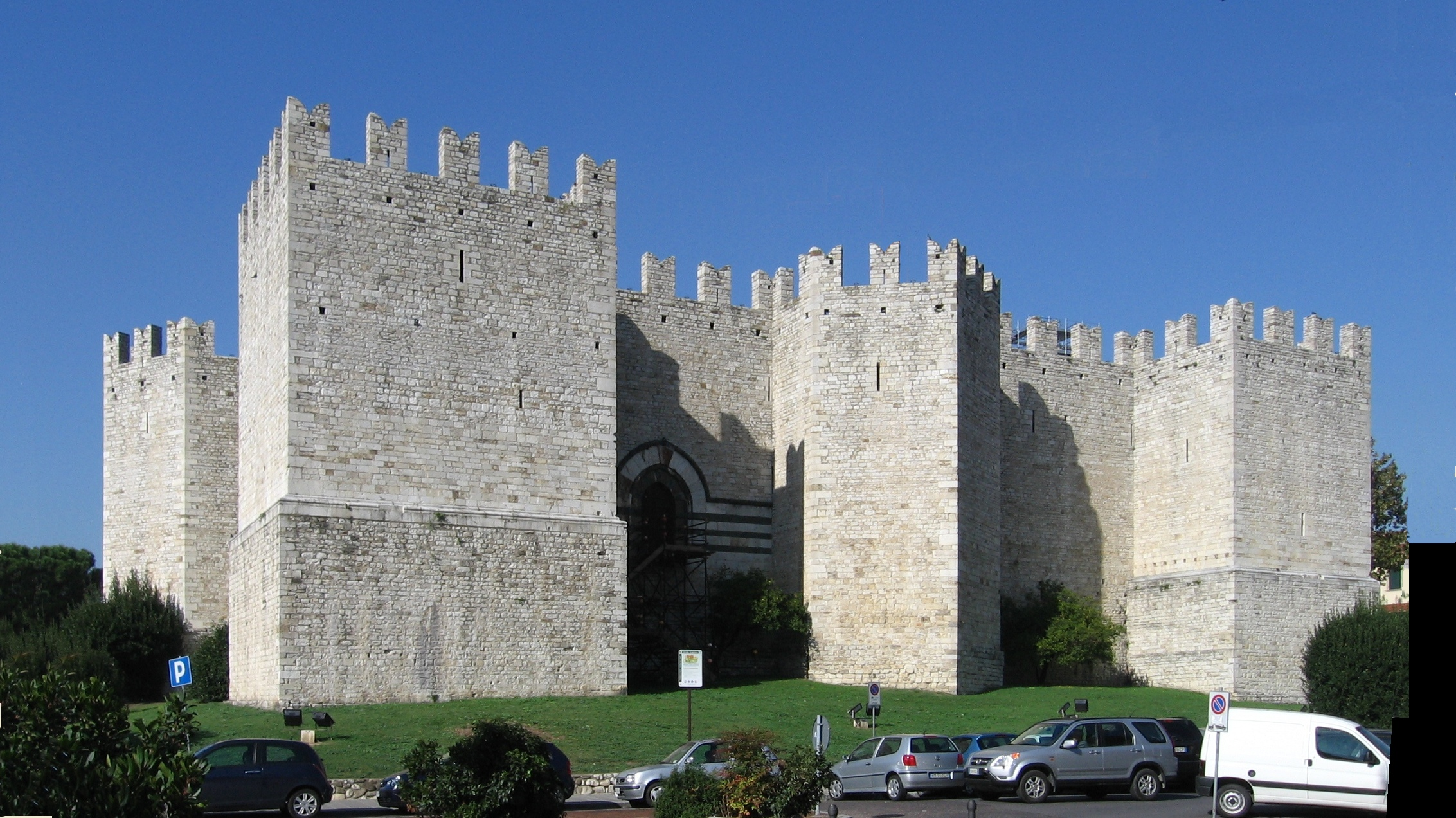 Il Castello dell'imperatore di Prato, vista da S-E